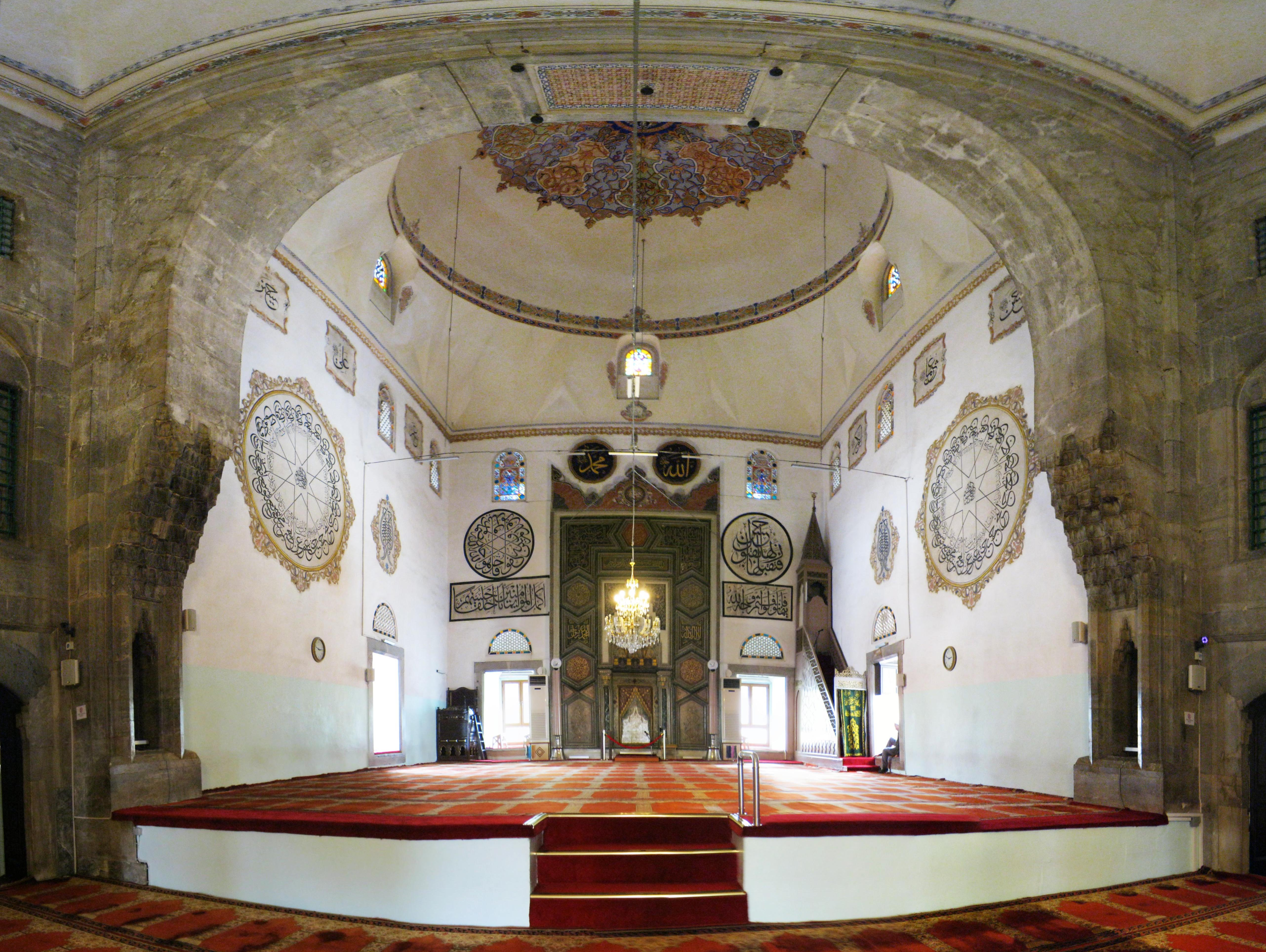 yıldırım Bayezid camii bursa